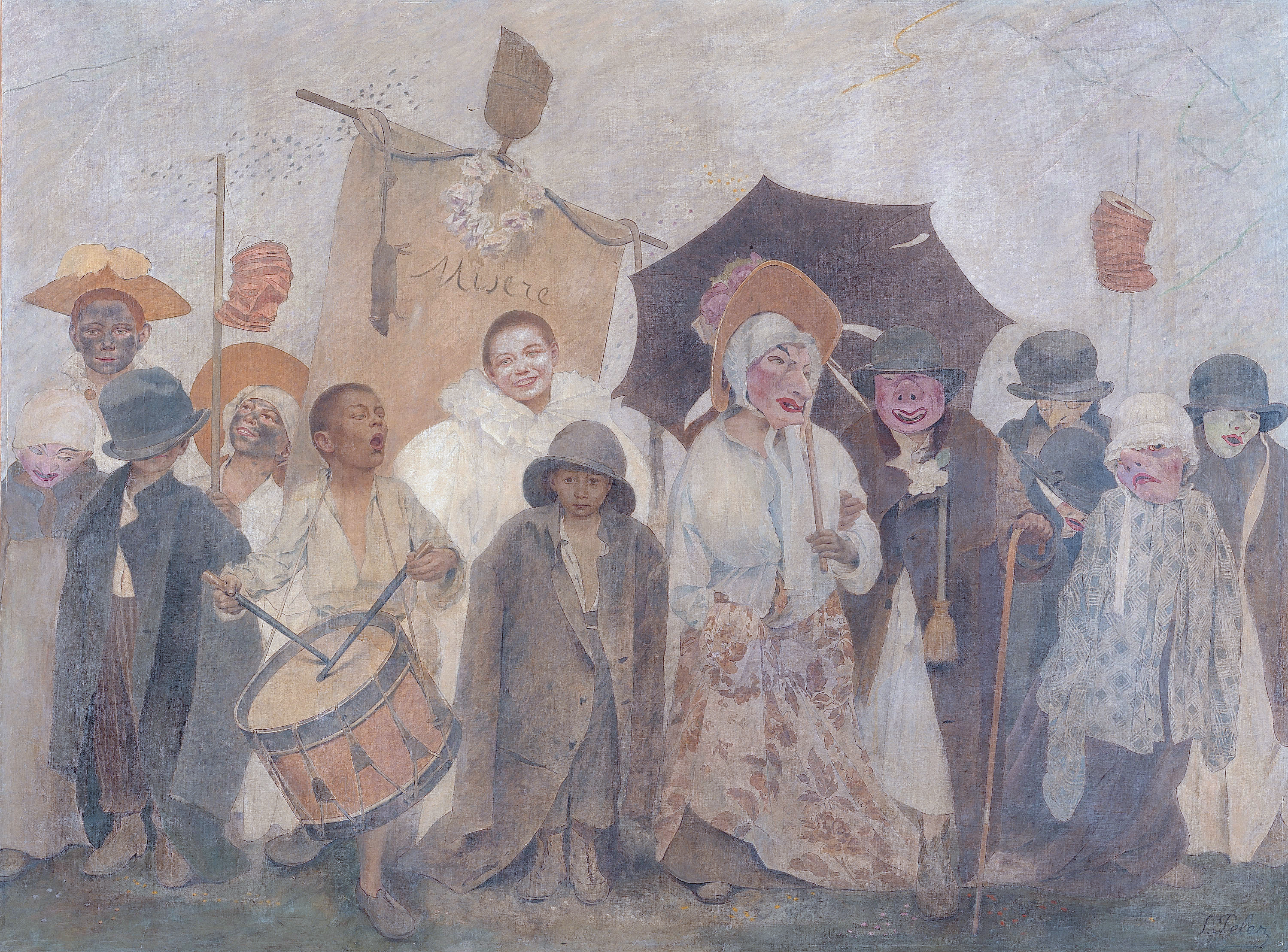 La Vachalcade 1896 vue par Fernand Pelez, tableau de très grand format conservé à Paris au musée du Petit Palais où il n'est pas exposé en permanence.